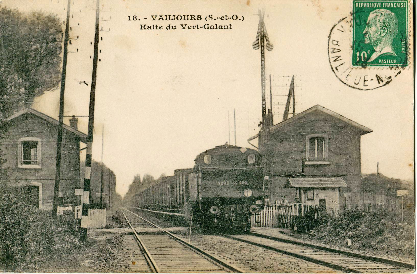 Carte postale ancienne sans mention d'éditeur : VAUJOURS - Halte du Vert-GalantRame tractée par la locomotive tender Nord 2.262